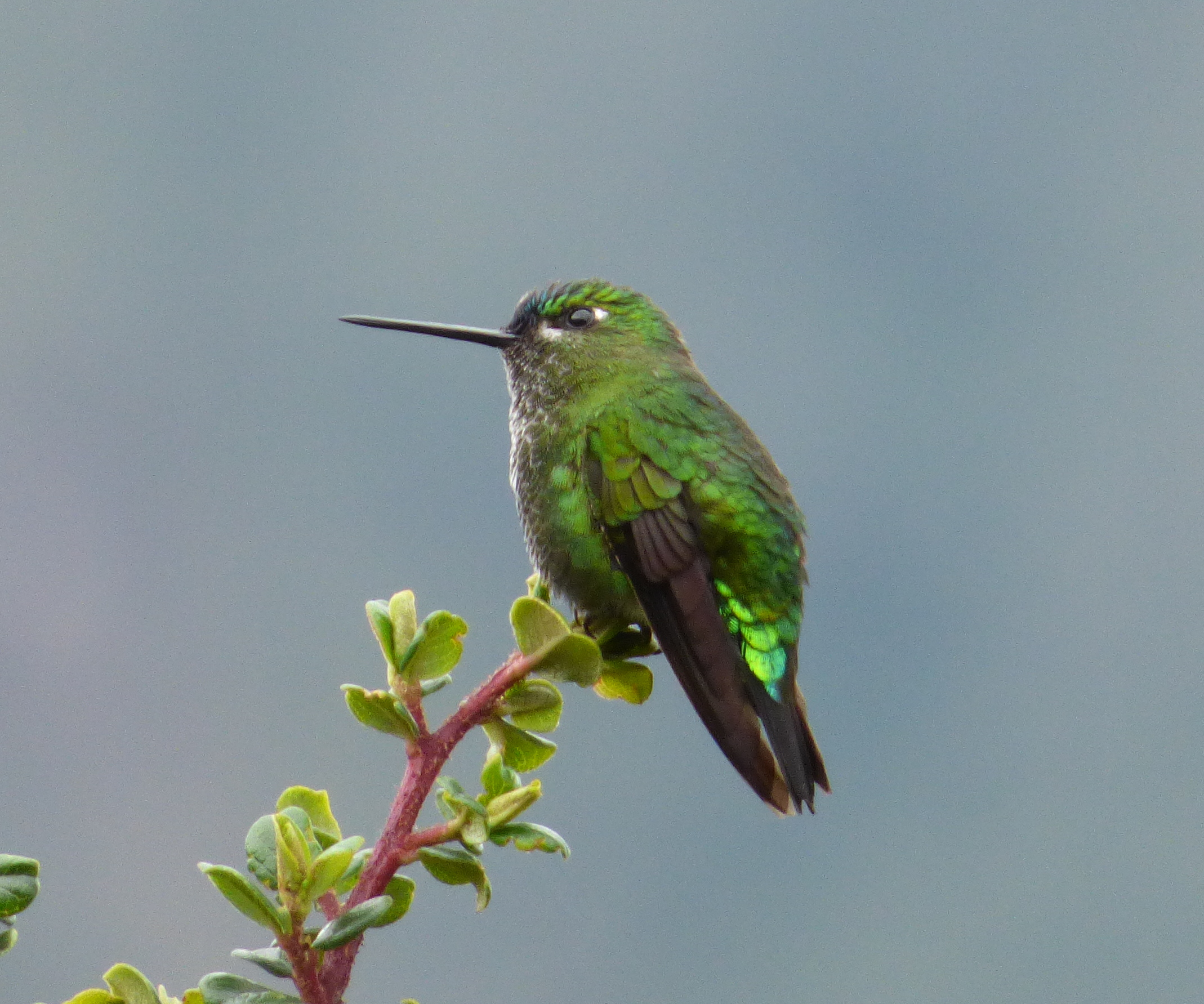 Eriocnemis derbyi (Paramero rabihorcado)